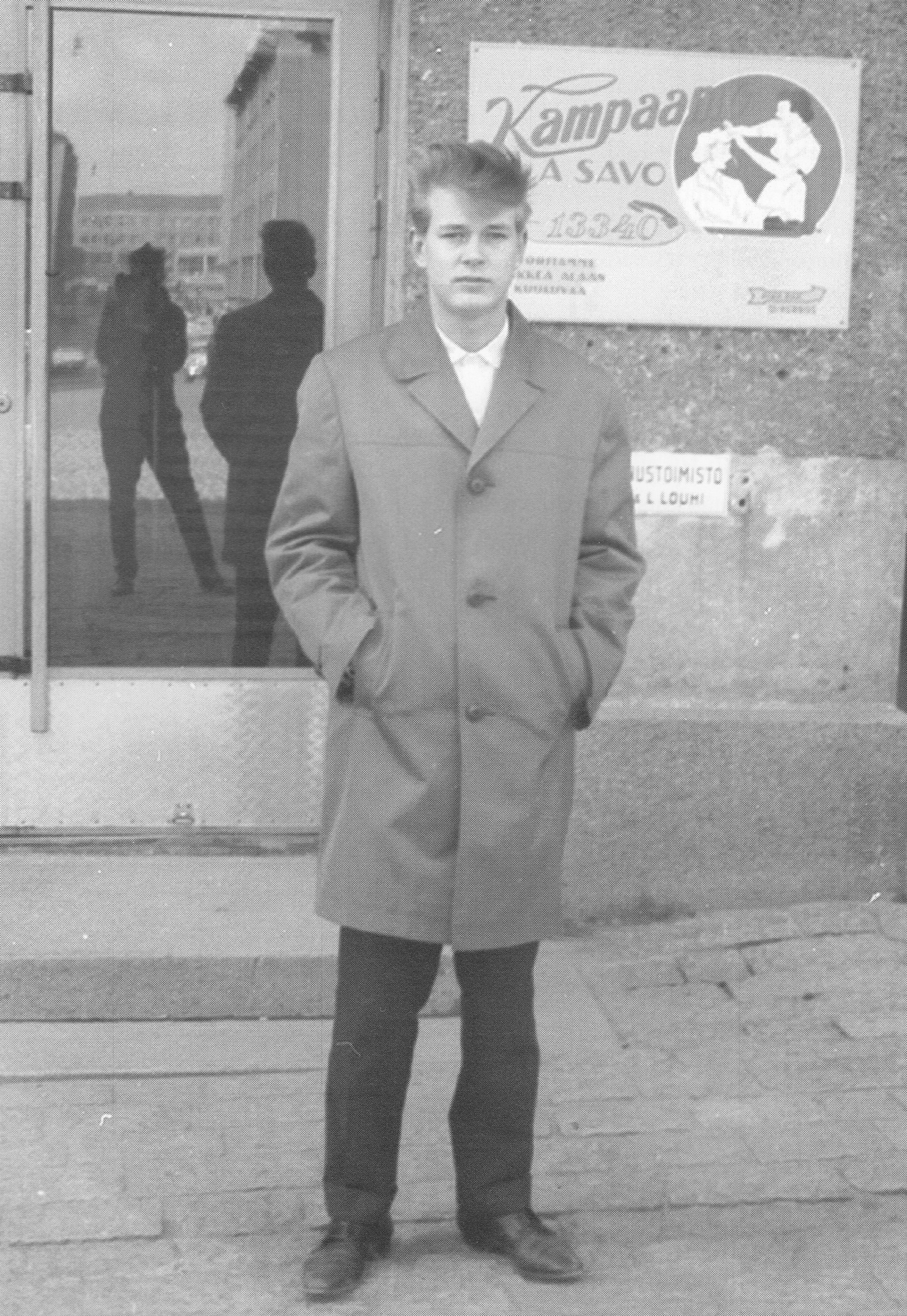 Pekka Loukiala kotitalonsa eduatlla vuonna 1959